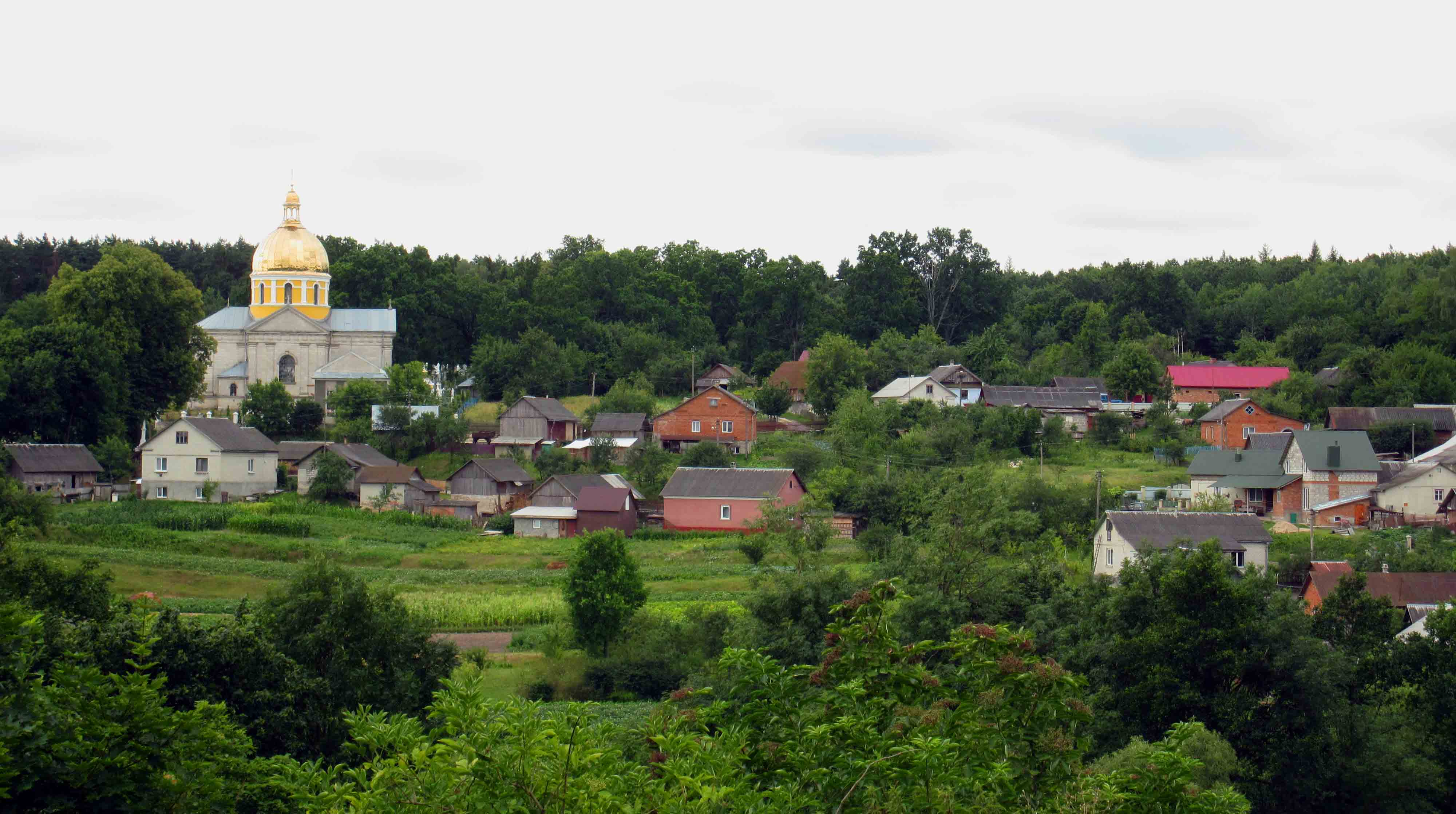 Панорама Мильного (Зборівський район, Тернопільська область)